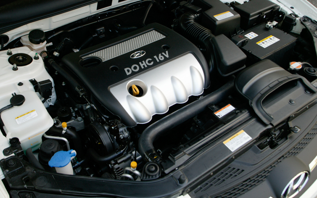 Hyundai Sonata I4 2.4L engine.